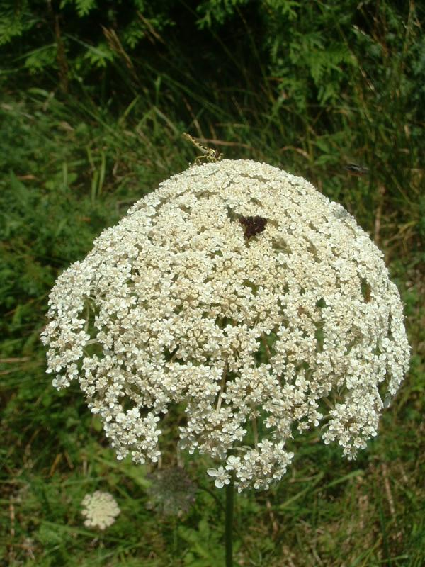 Carotte sauvage, photo, Vantoux-et-Longevelle